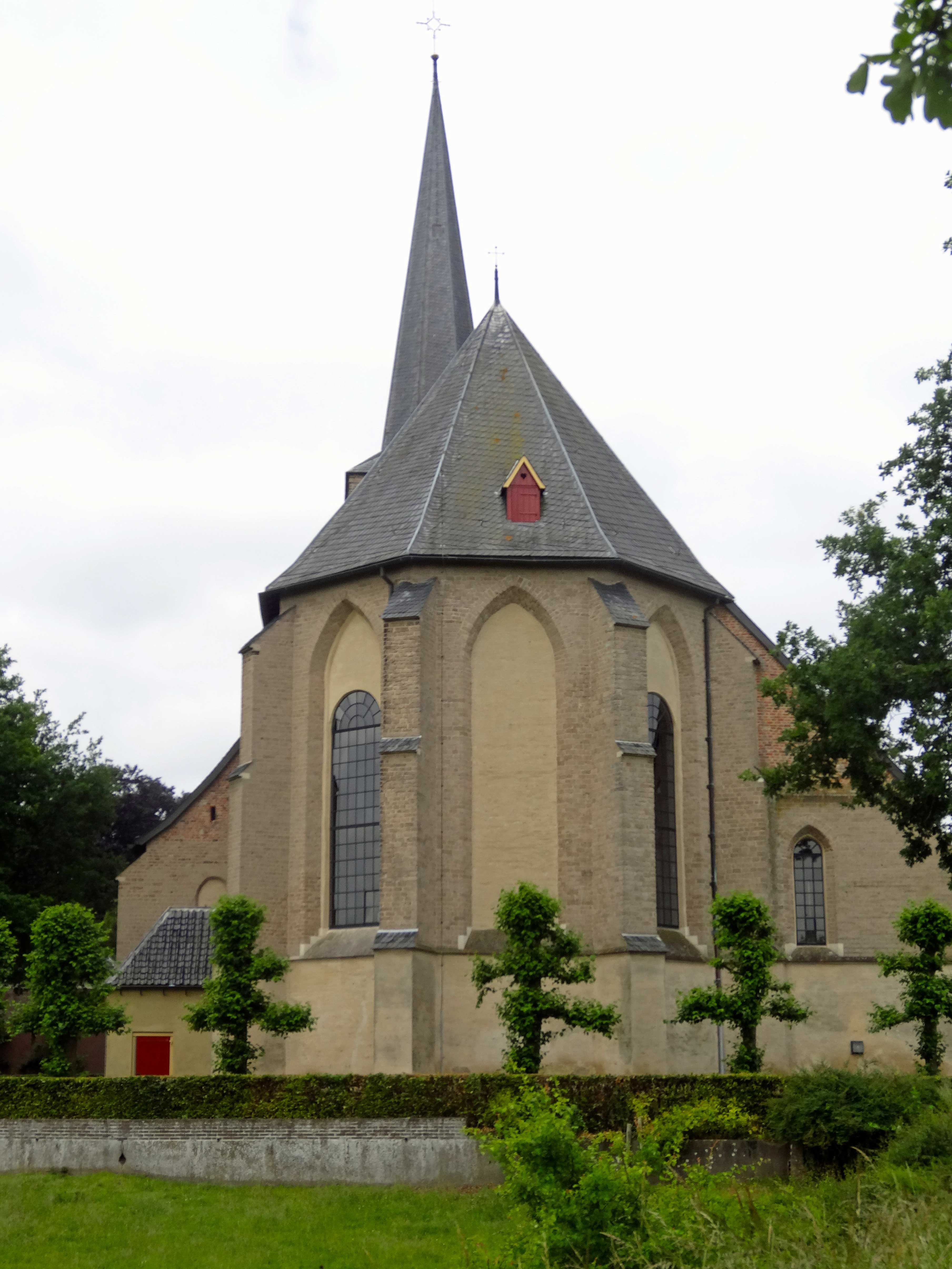 Kerk van Voorst gezien vanuit het oosten